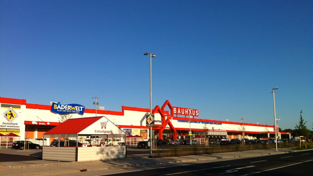 Altes Bauhaus-Geschäft Flensburg